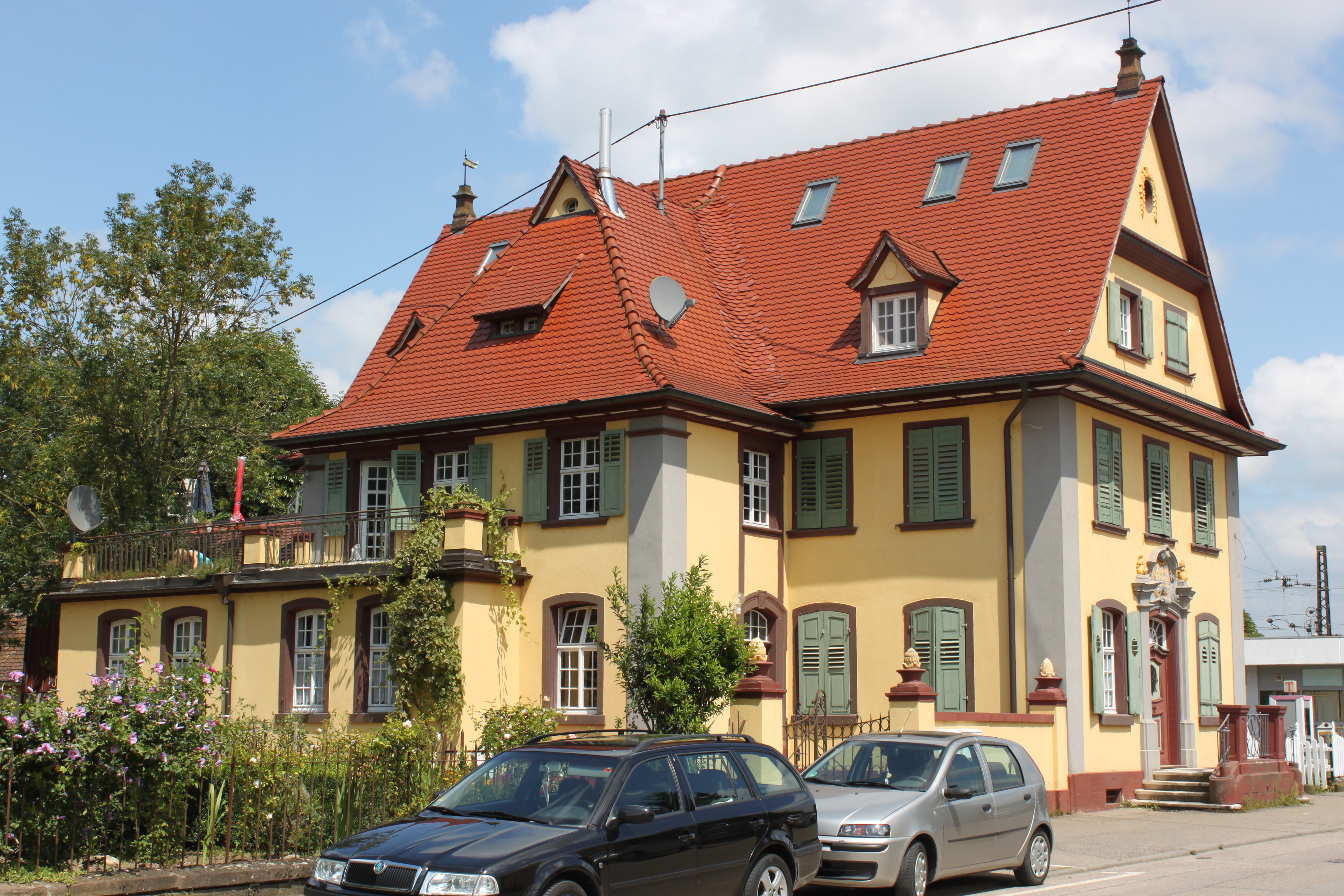 Die Bahnhofwirtschaft der Brauerei Meyer & Söhne Riegel; erbaut an der damals neuen Rheintalbahnstrecke, heute Wohnhaus